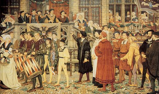 Optocht van de rederijkerskamer «De Violieren» in 1539